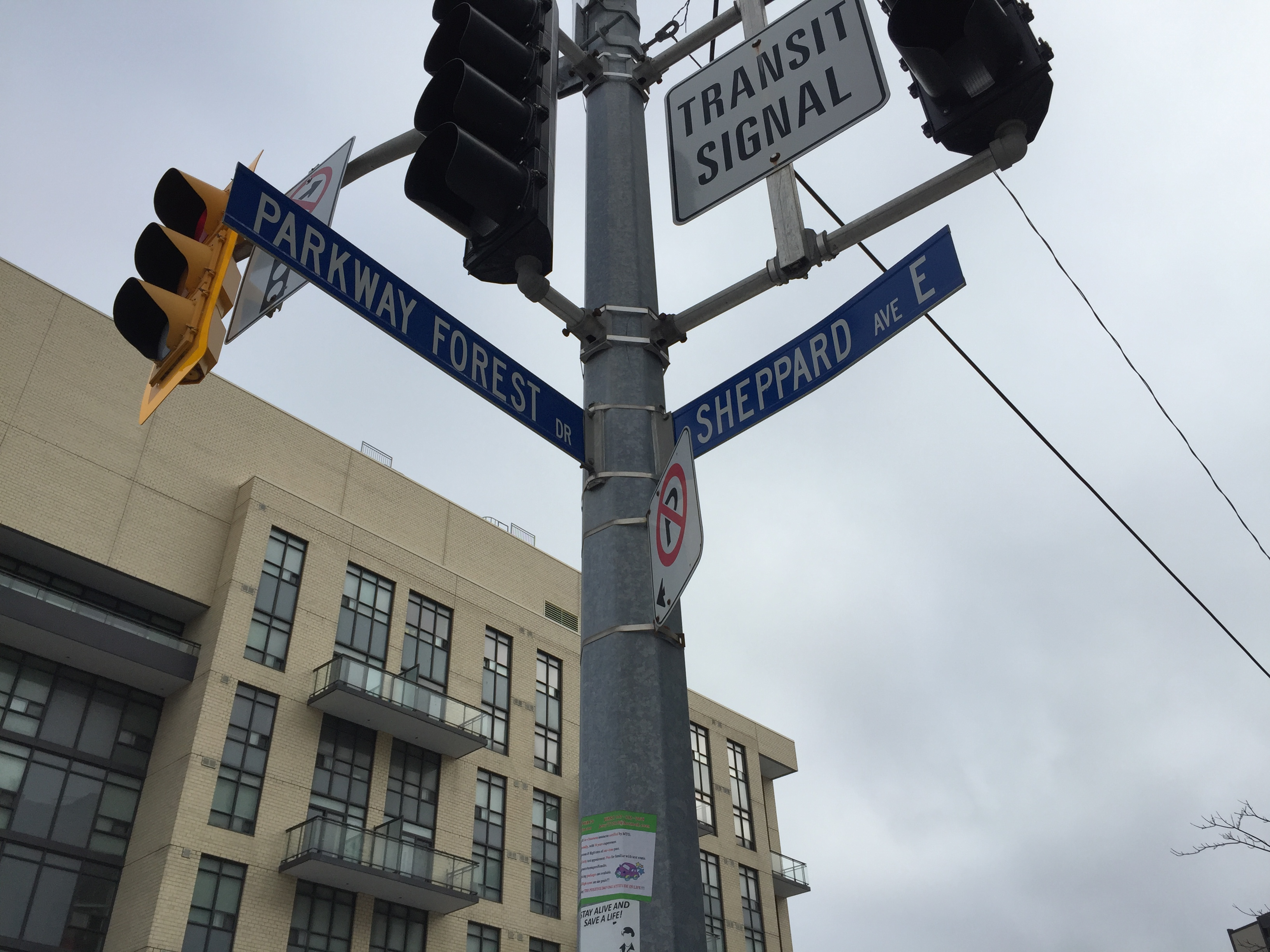 کوردی: پارکوەی فۆرێست درایڤ